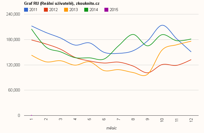 Zkoukni.to, meziroční srovnní návštěvnosti Netmonitor - kurzy.cz